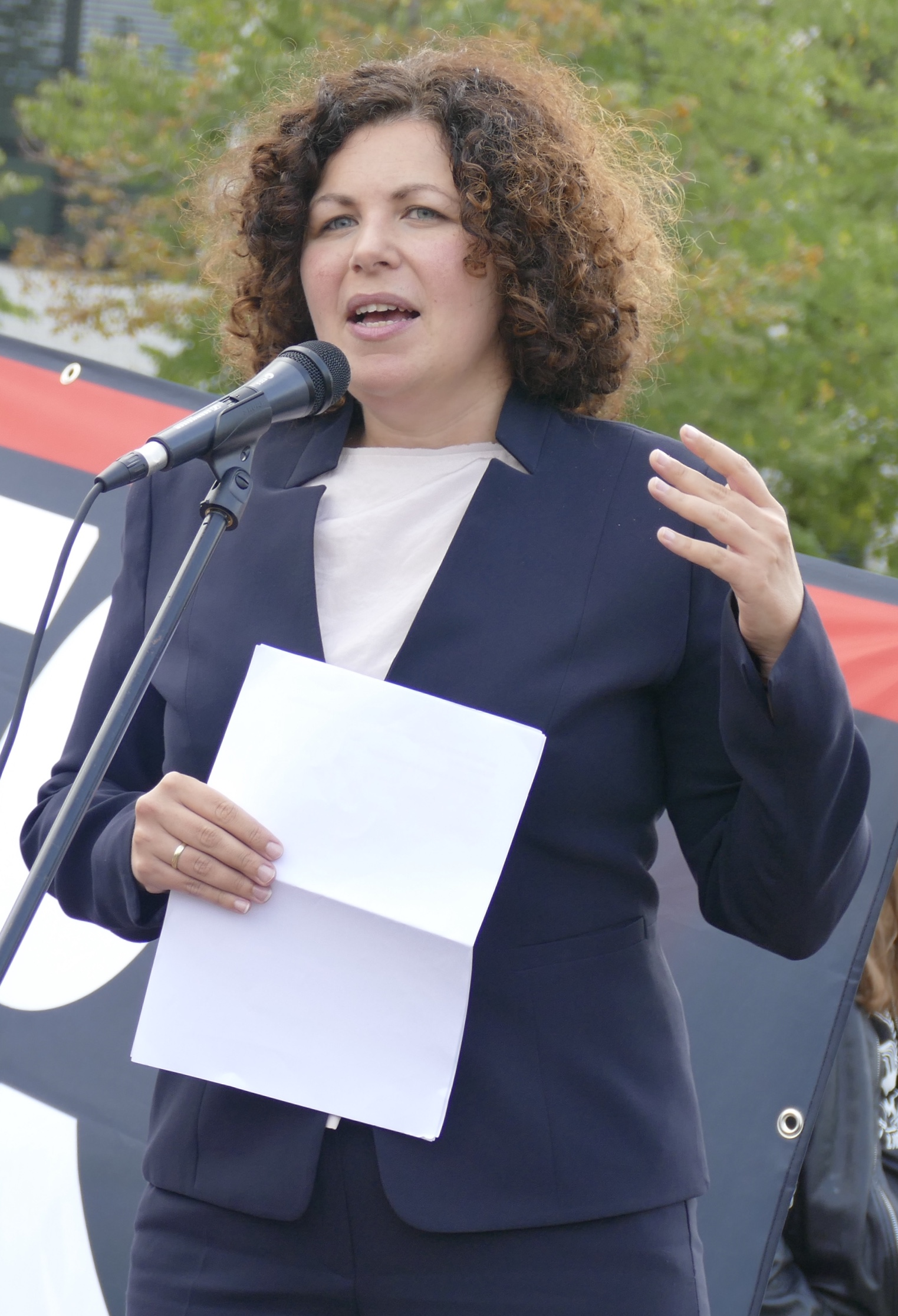 MdB Amira Mohamed Ali (DIE LINKE) redet auf einer Veranstaltung in Rheda, Nordrhein-Westfalen.